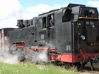 Oechsle-Lokomotive 99 788 in Ochsenhausen-Warthausen, Deutschland